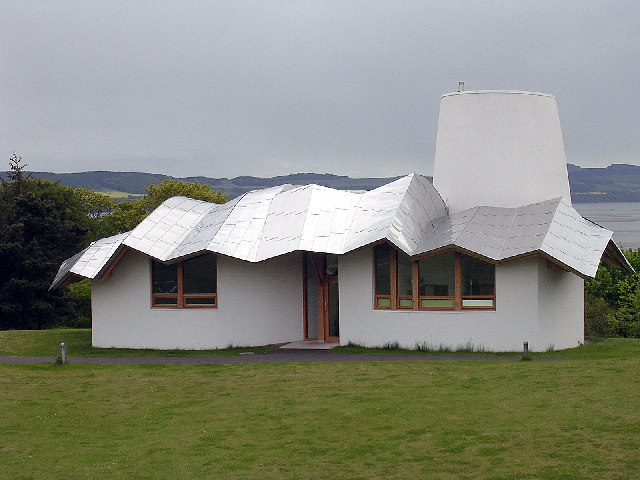 Maggie's Centre, Dundee, Scotland.